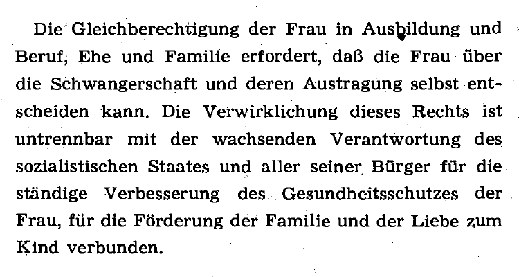 Präambel des Gesetzes über die Unterbrechung der Schwangerschaft, beschlossen von der Volkskammer der DDR am 9. März 1972